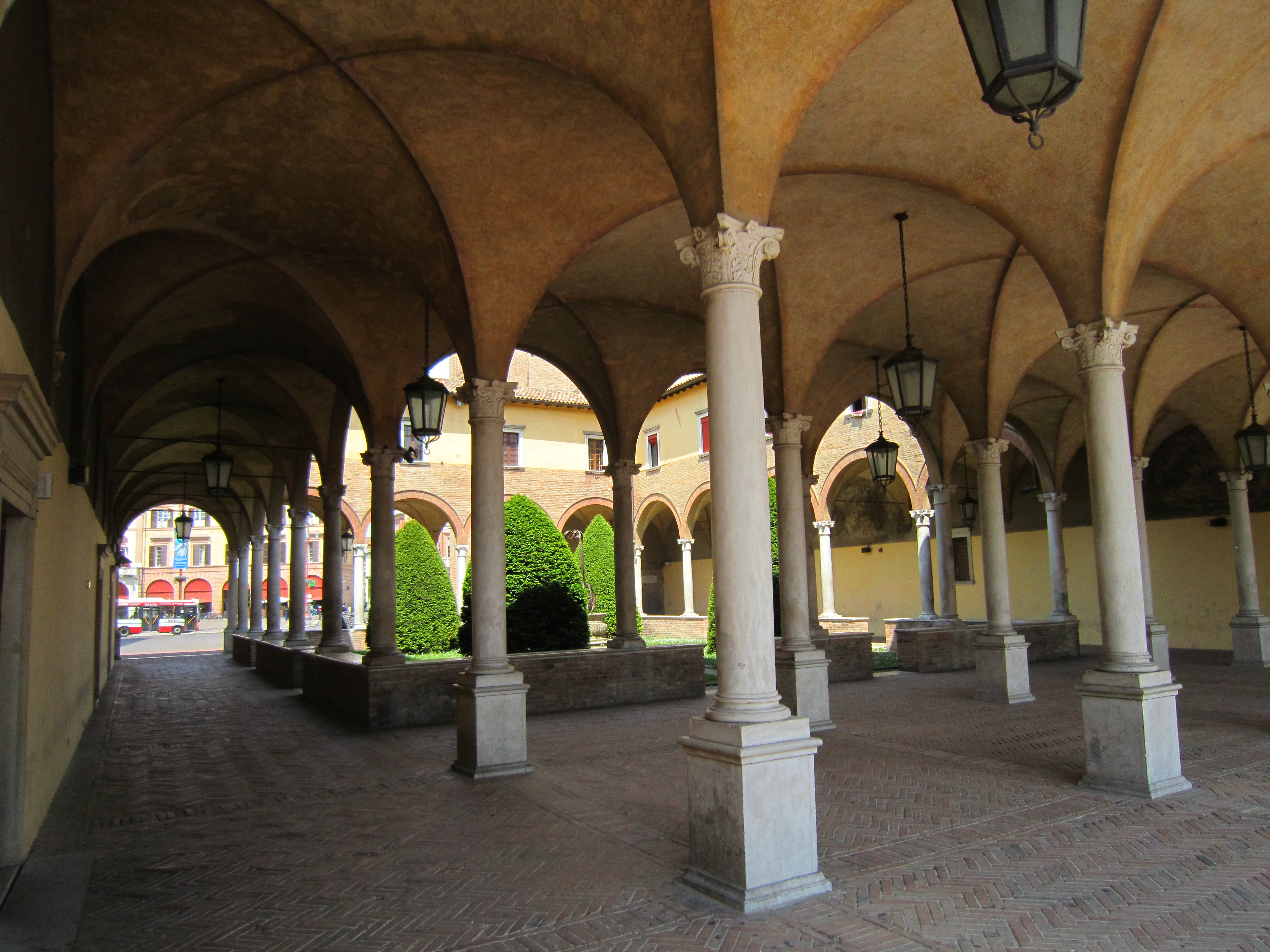 Chiostro dell'abbazia di San Mercuriale, Forlì.